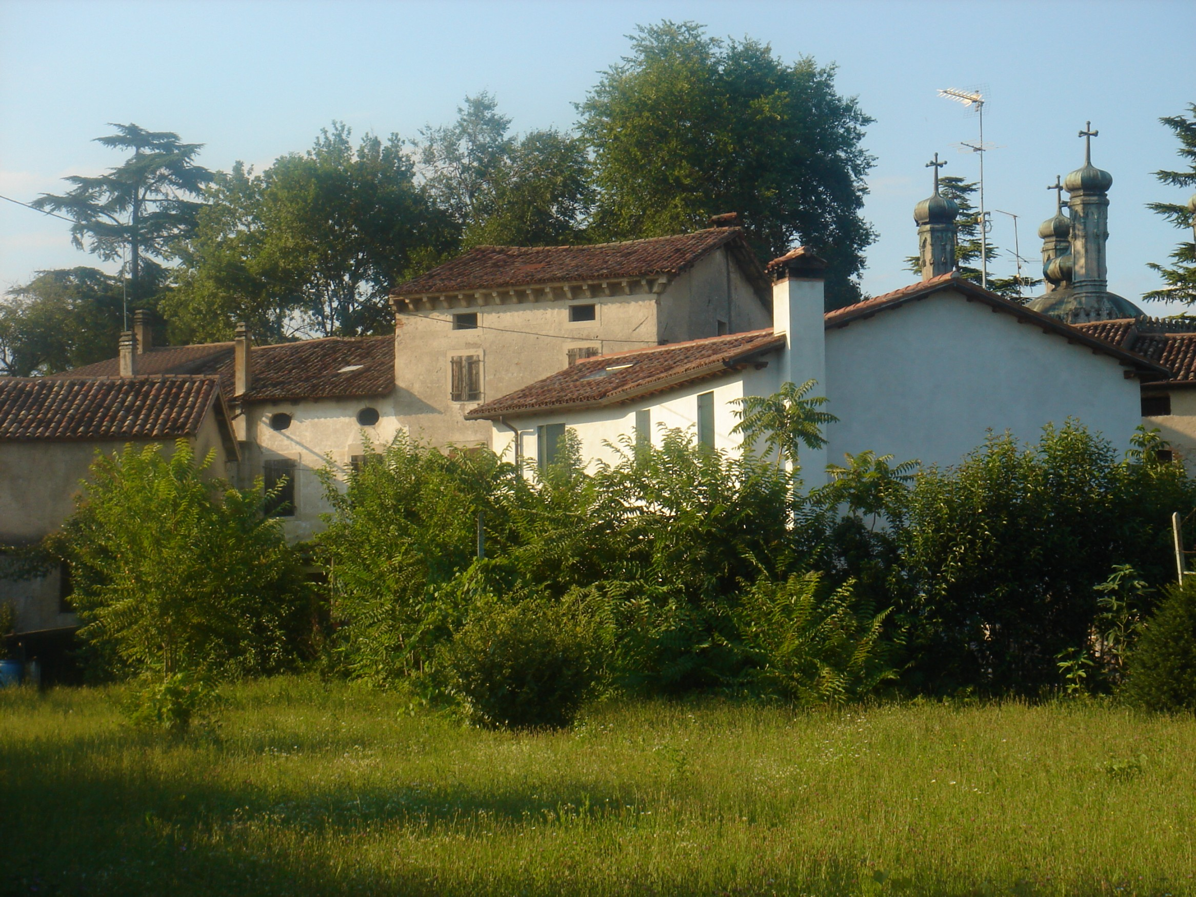 Foto di Paolo Steffan Licensing Categoria:Immagini esclusivamente in GNU FDL